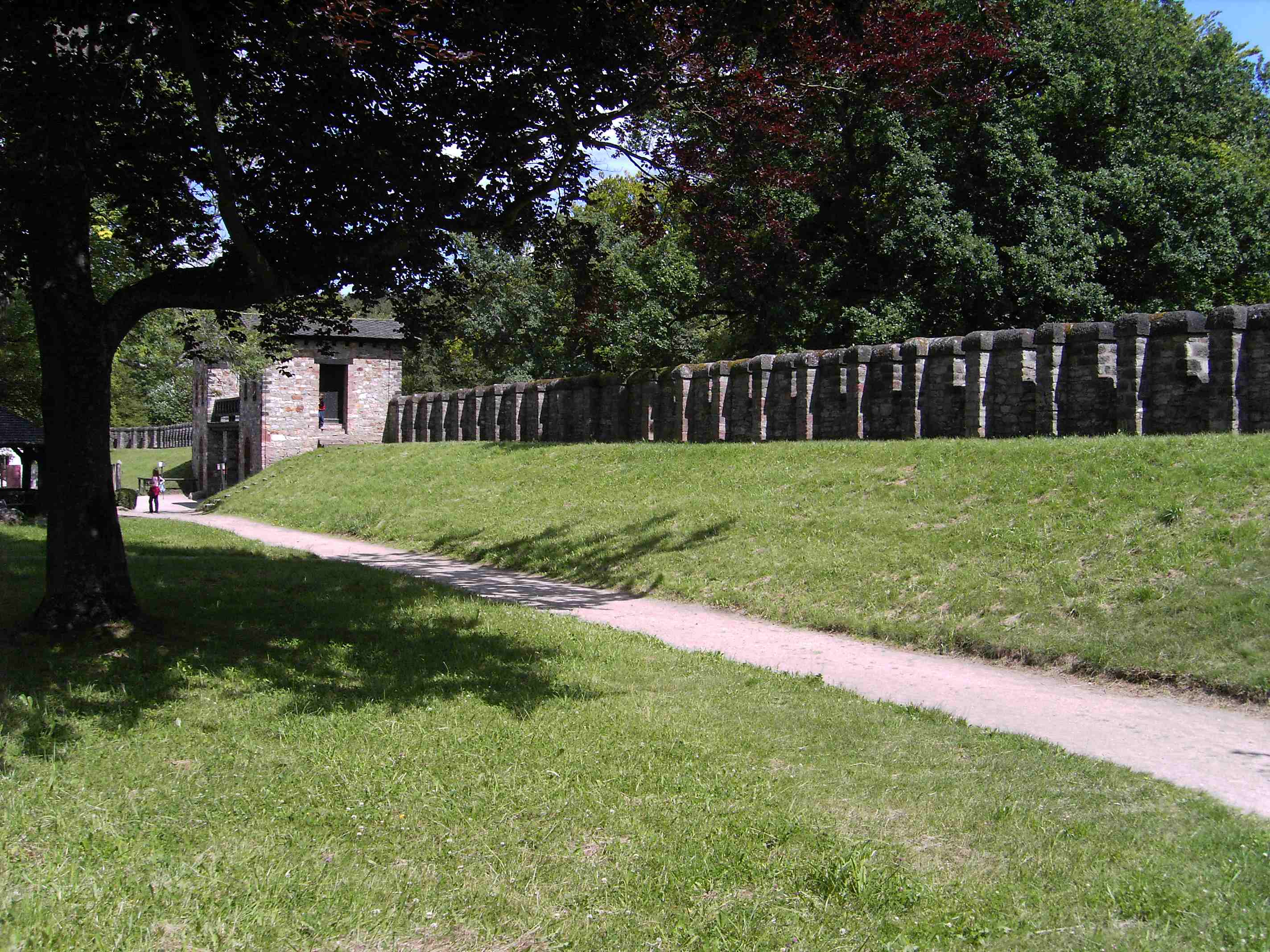 Rampe zur Wehrmauer in der Saalburg (Rekonstruktion). Der Mauerkranz war für die Legionäre im Verteidigungsfall an allen Abschnitten bequem über eine Erdrampe zu erreichen. Im Hintergrund ist die Innenseite der Porta Praetoria zu sehen.